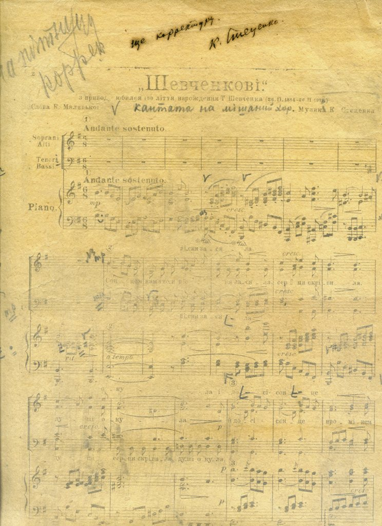 К. Стеценко. «Шевченкові». Кантата для мішаного хору у супроводі фортепіано на слова К. Малицької, написана до 100-річчя від дня народження Т. Шевченка. Авторська коректура. 1914 р. ЦДАМЛМ України, ф. 175, оп. 1, од.зб. 7, арк. 1.